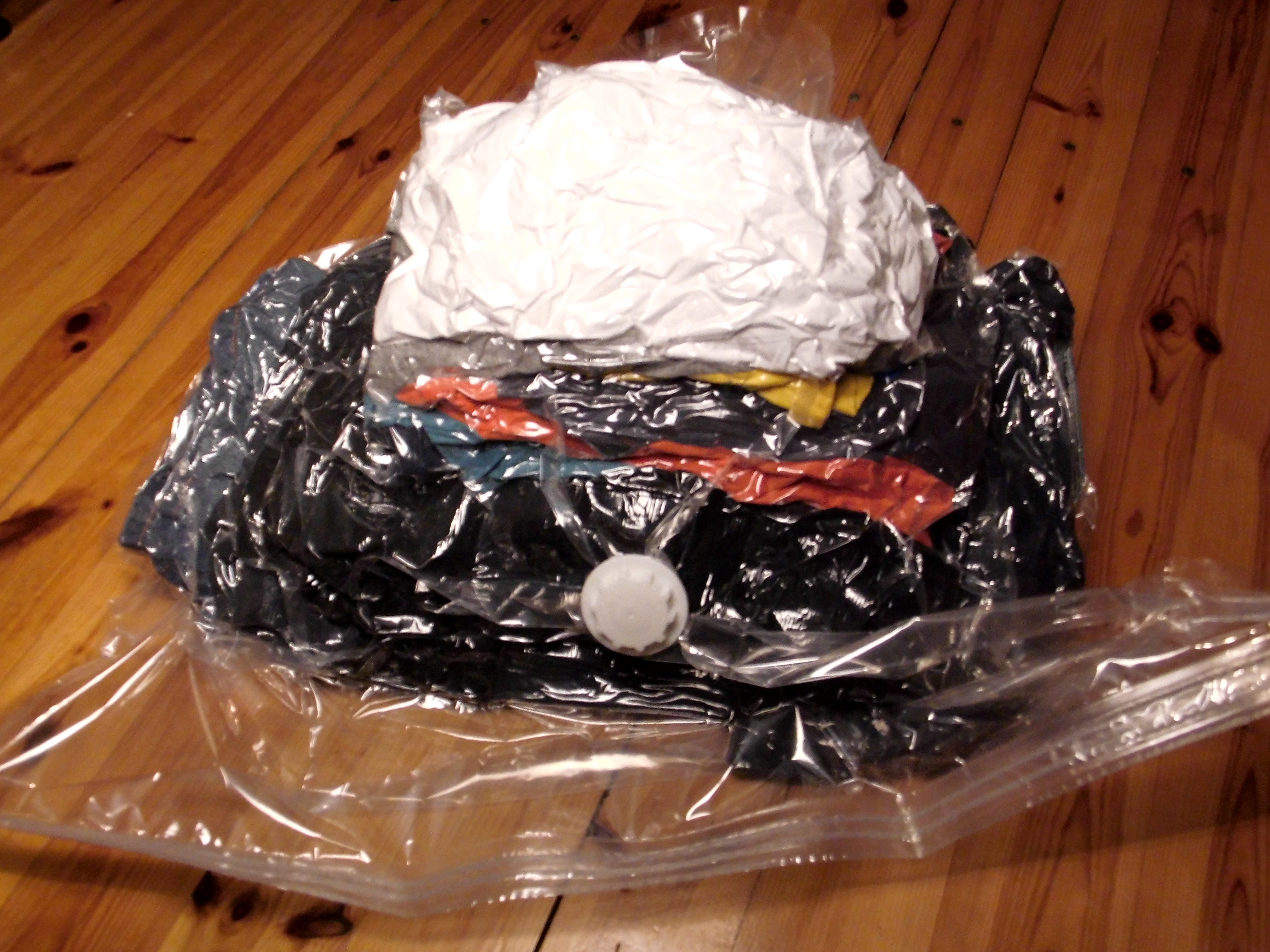 Worek próżniowy - gadżet używany dla oszczędności miejsca